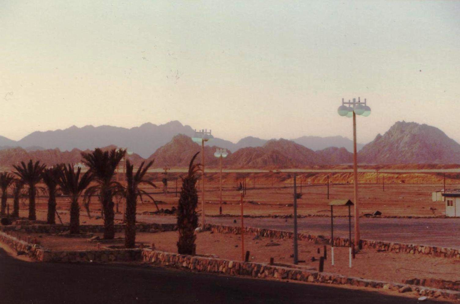 Naama Bay im Dezember 1984